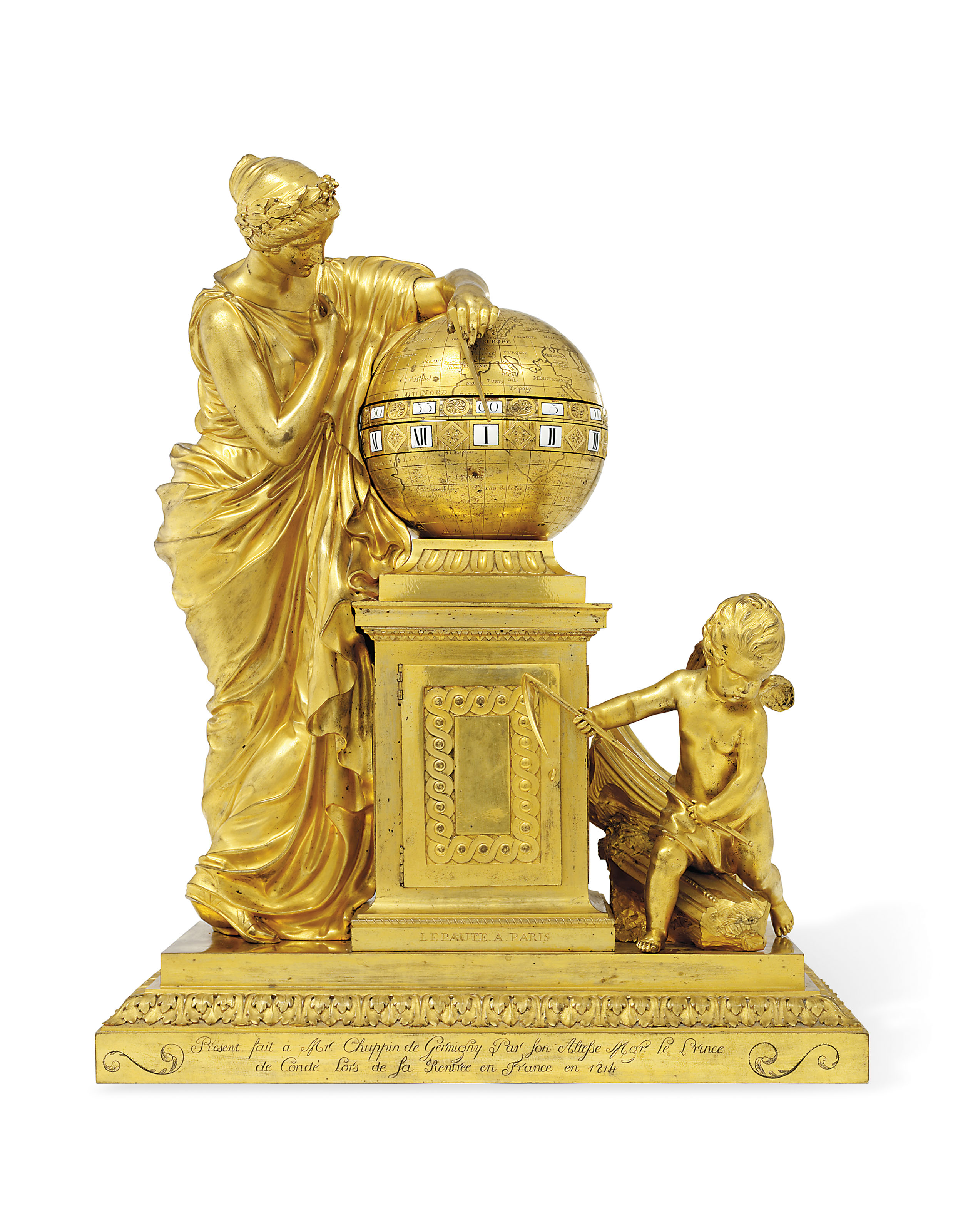 La muse Clio, jeune fille debout, drapée et couronnée de lauriers pose son coude gauche sur le globe terrestre. Sa main gauche désigne avec un stylet l'heure. Son livre est à terre sur une colonne de temple antique brisée et une section de tronc d'arbre. Le globe, gravé des continents et de certains pays, repose sur un piédestal qui cache les rouages accessibles par deux portes avant et arrière discrètes. L'équateur est divisé en deux cercles indépendants l'un de l'autre qui tournent progressivement dans le sens horaire. Sur le cercle supérieur les minutes sont inscrites en caractères arabes sur des plaques émaillées séparées par des feuilles gravées dans des cadres ovales. Sur le cercle inférieur les heures sont inscrites en caractères romains jusqu'à XII séparées par des feuilles dans des losanges. De l'autre côté se trouve au sol un génie du temps représenté par un putto ailé ceint d'un tissu. Cet angelot à califourchon sur le tronc tient une faux. L'ensemble est en bronze doré.